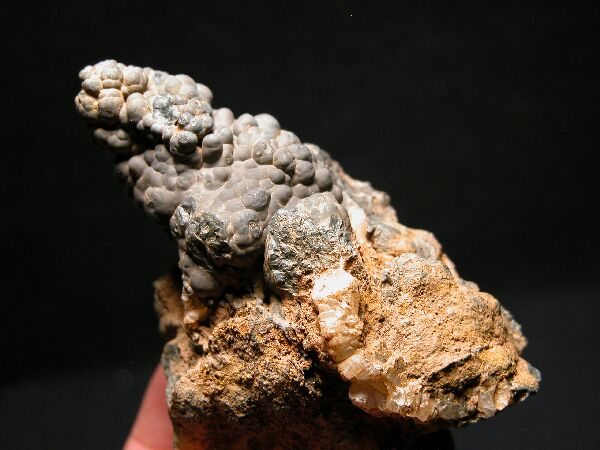 kryptomelan, pochodzenie Maroko; autor zdjęcia Piotr Menducki; 12.o8.2006r